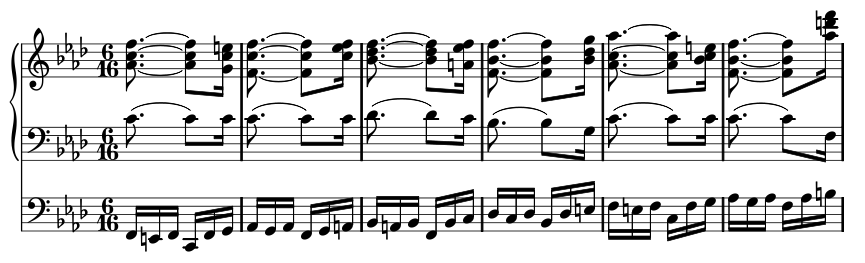 Début de la pièce opus 18 n° 7 de Boëly. On remarque la redoutable partie de pédale à même d'intimider plus d'un organiste.